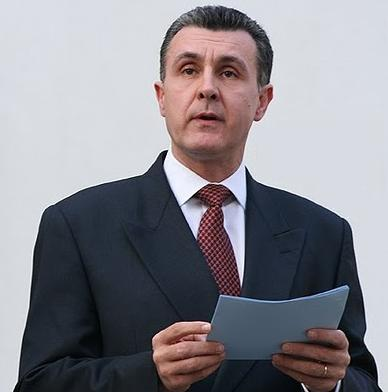 Principele Radu la lansarea candidaturii la presedintie la Palatul Elisabeta din Bucuresti din 10 aprilie 2009.